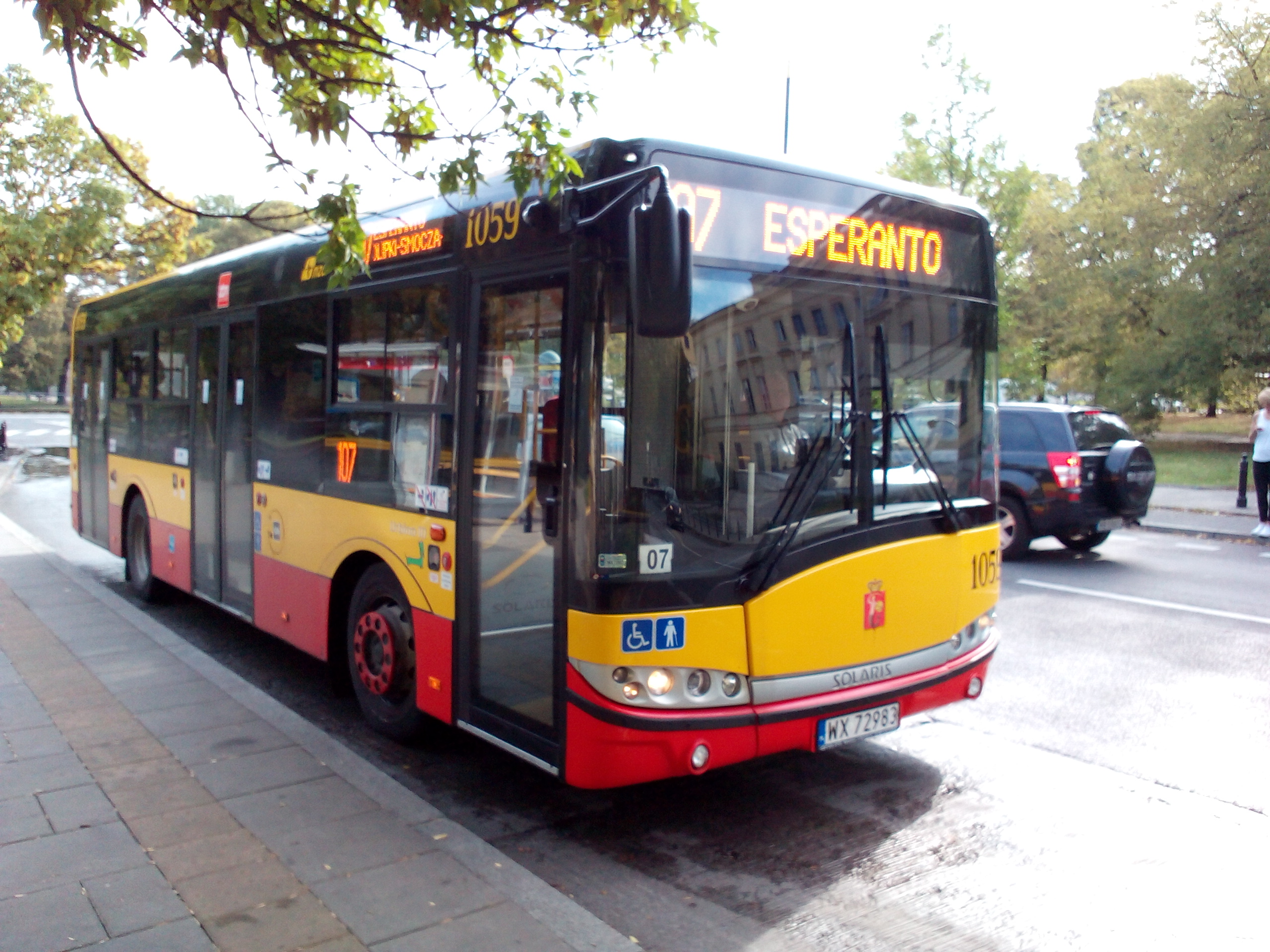 Haltiĝinta aŭtobuso de la linio 107 veturanta al la fina stacio Esperanto en Varsovio The code number of this Zamenhof/Esperanto object is pl-050. Wikidata has entry Q57081546 with data related to this item.